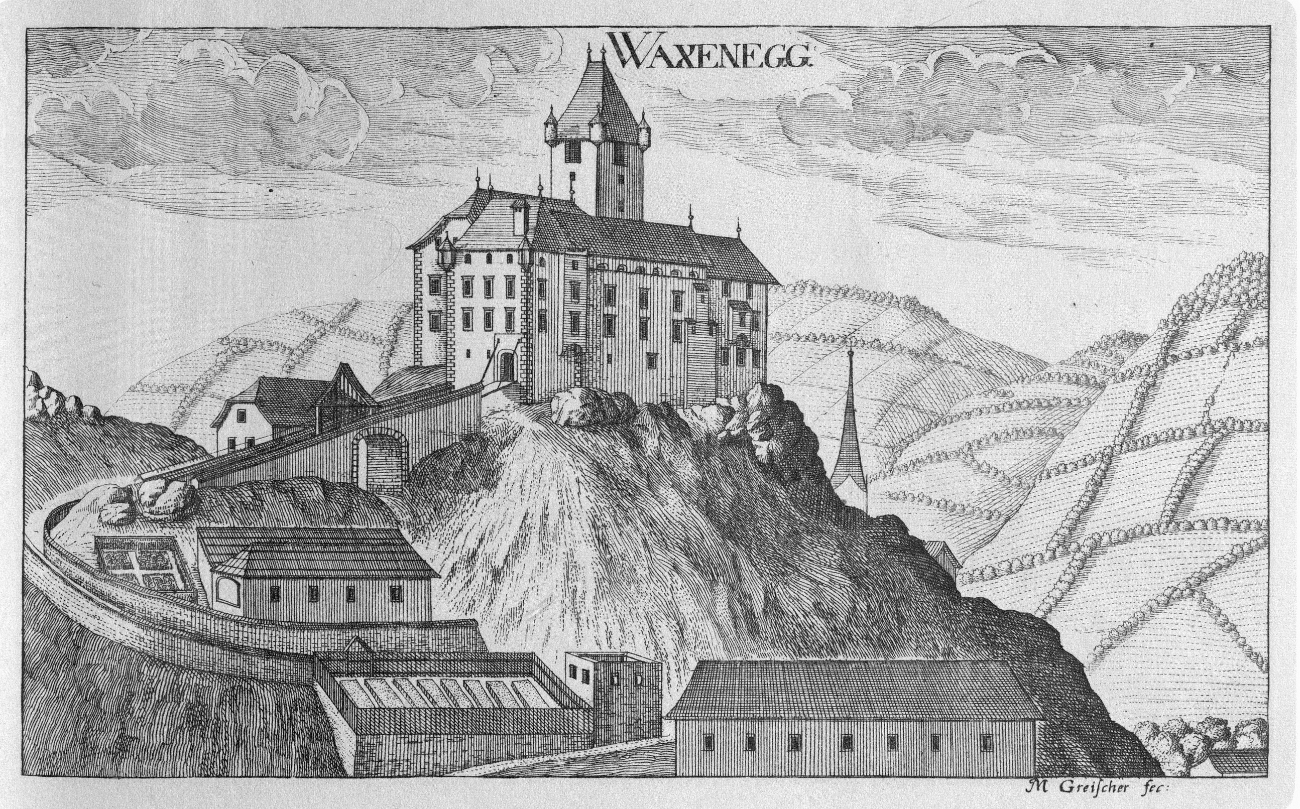 G. M. Vischers Käyserlichen Geographi, Topographia Ducatus Stiriae, Das ist: Eigentliche Delineation / und Abbildung aller Städte / Schlösser / Marcktfleck / Lustgärten / Probsteyen / Stiffter / Clöster und Kirchen / so es sich im Herzogthumb Steyrmarck befinden; Und anjetzo Umb einen billichen Preyß zu finden seynd Bey Johann Bitsch Universitäts Buchhandlern / Auff dem Juden=Platz bey der guldenen Saulen. Graz 1681 Die Nummerierung der Dateien folgt der alphabetischen Reihung der Ortsnamen und entspricht nicht dem Vischer-Register